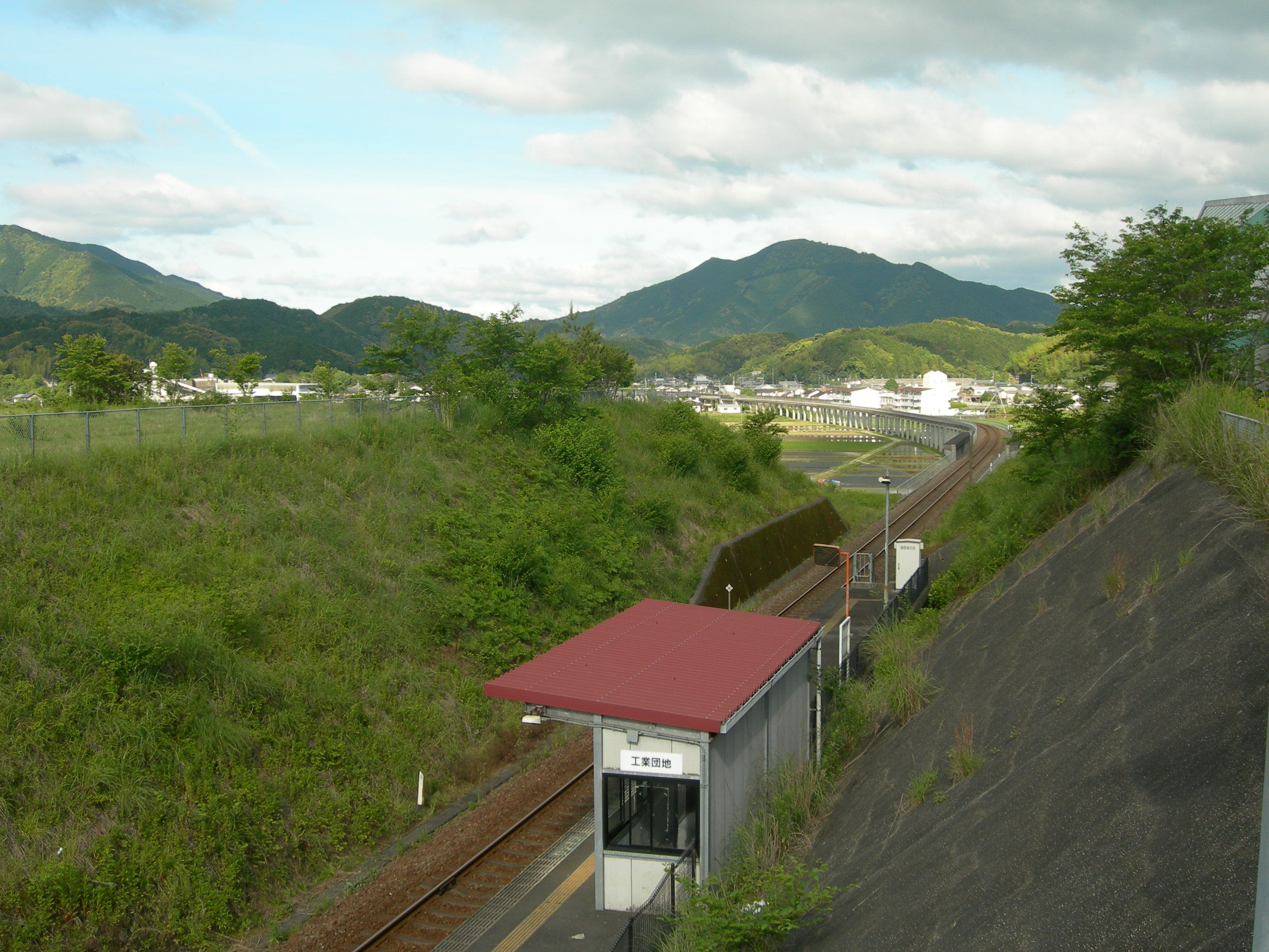 工業団地駅